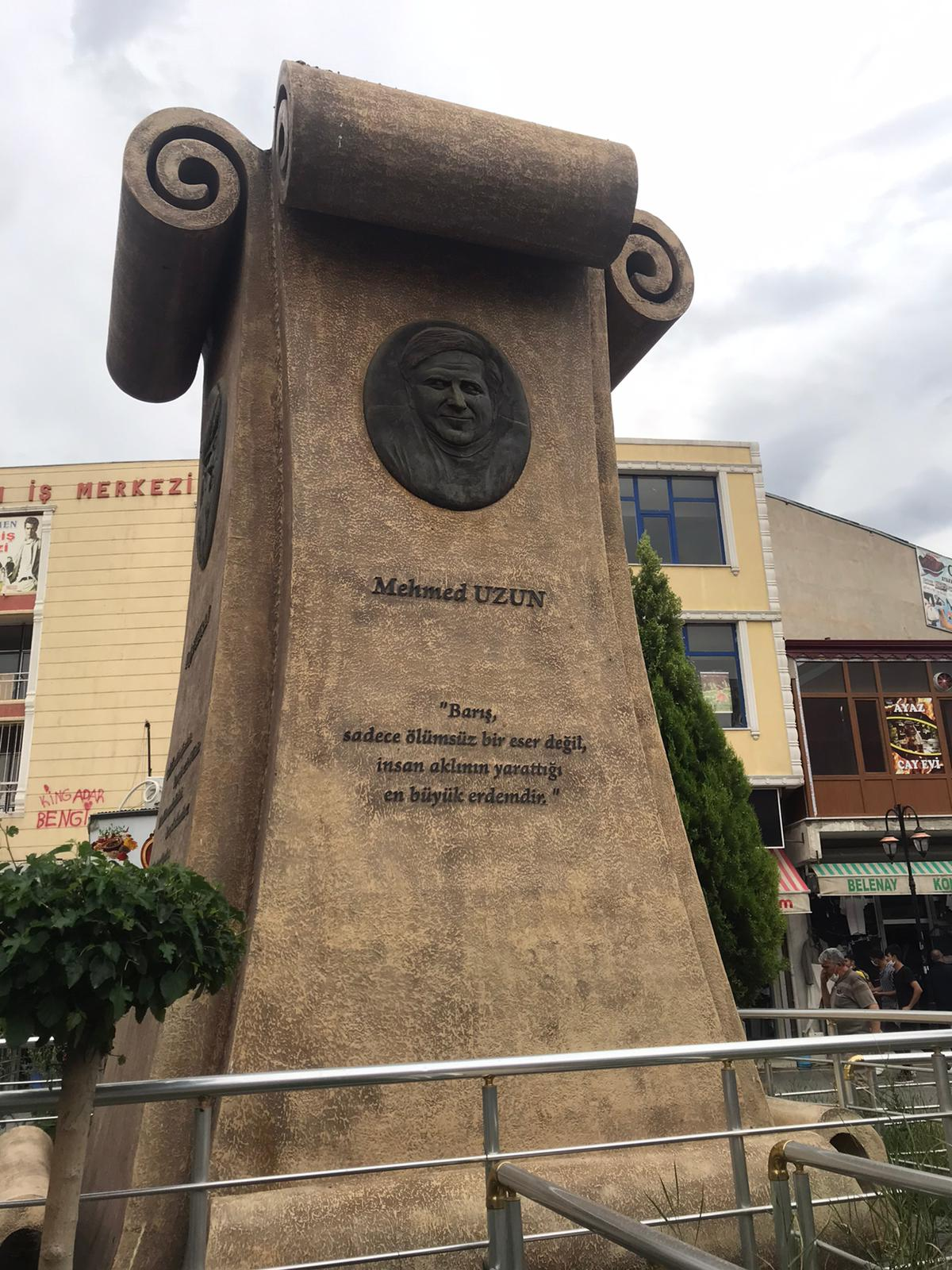 Iğdır, 4 Kurdish poet monuments